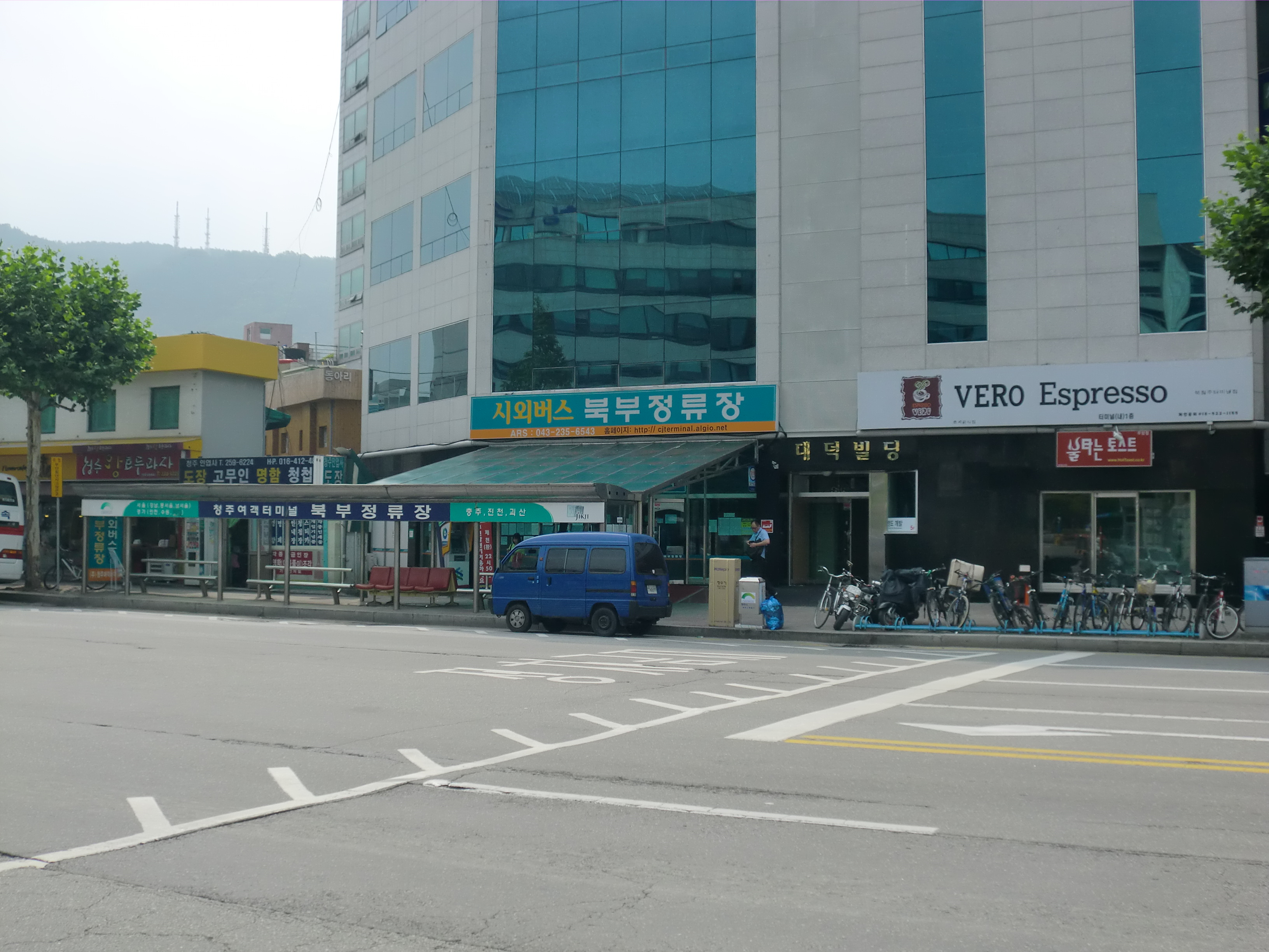 청주시에 있는 청주북부시외버스정류장